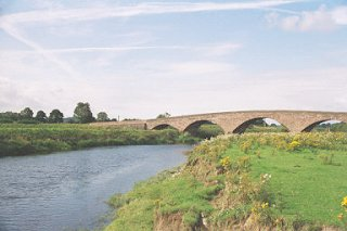 Río Isla y el Puente Keithwick.